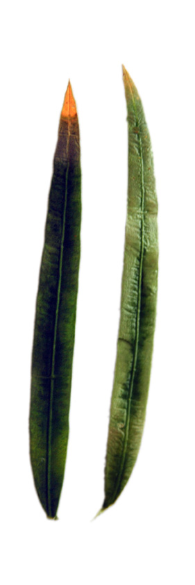 Cycas tansachana young leaflets